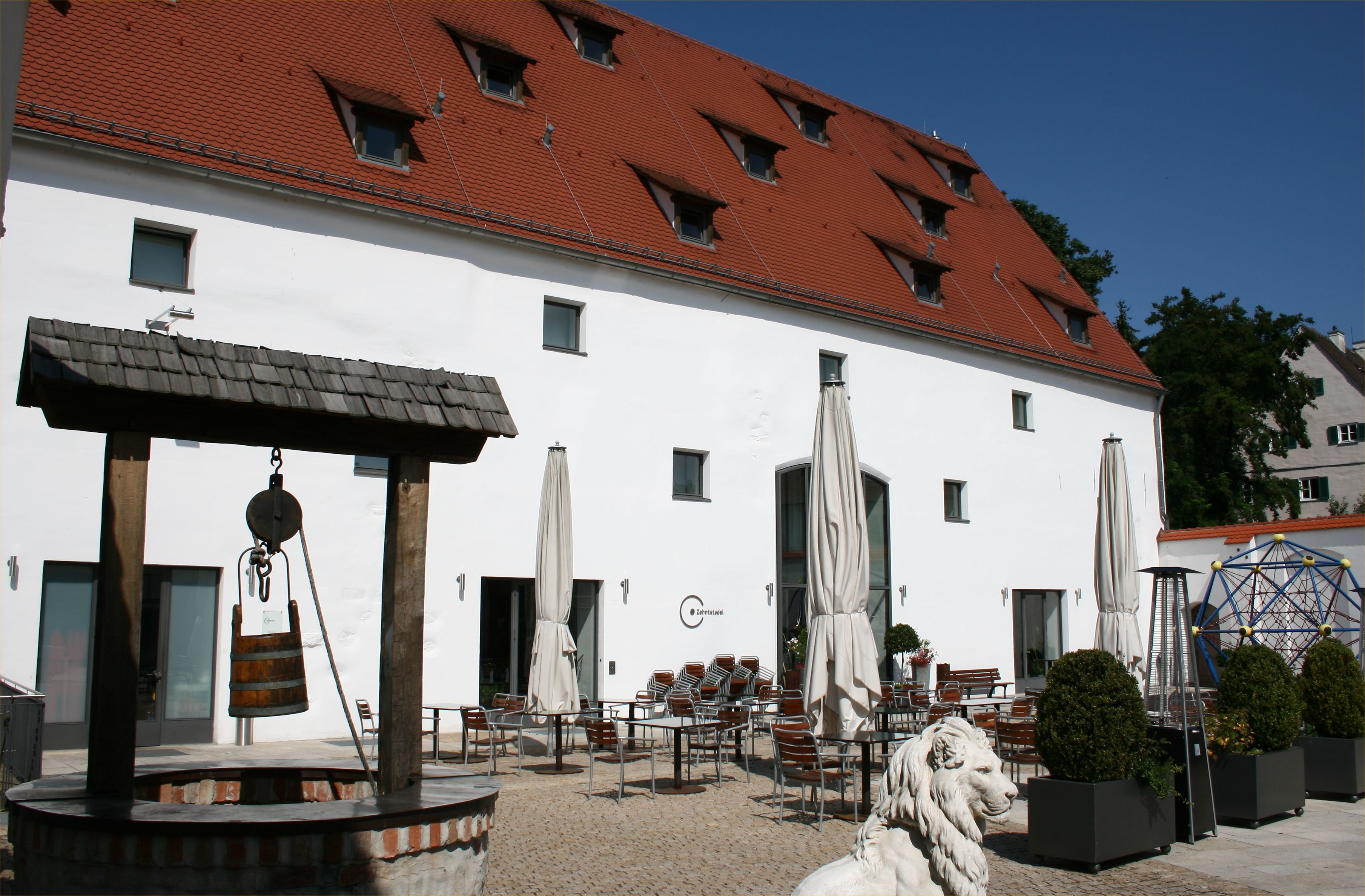 Im Zehntstadel in Leipheim im Landkreis Günzburg finden heute kulturelle Veranstaltungen statt